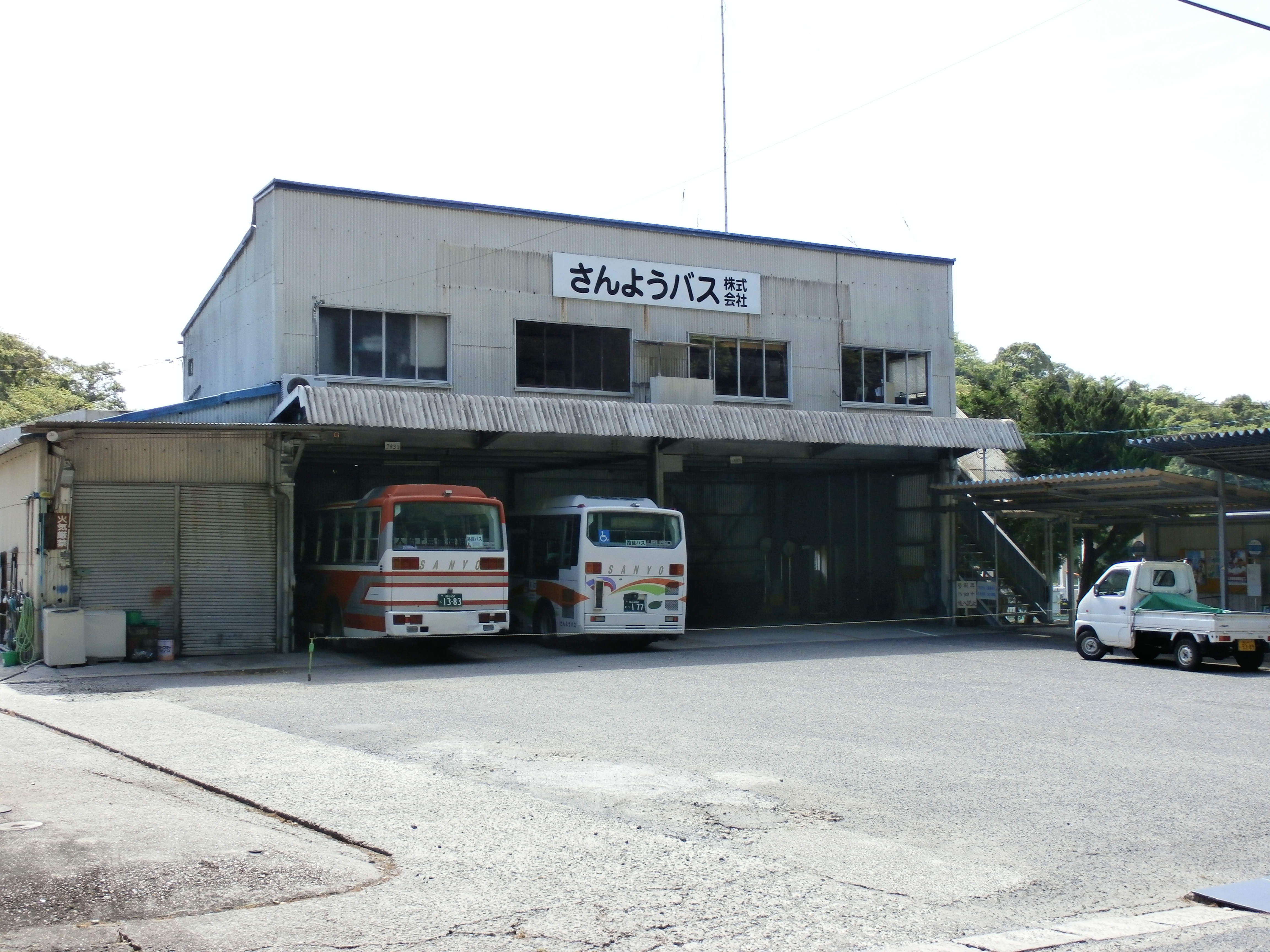 さんようバス（広島県 大崎上島町）本社